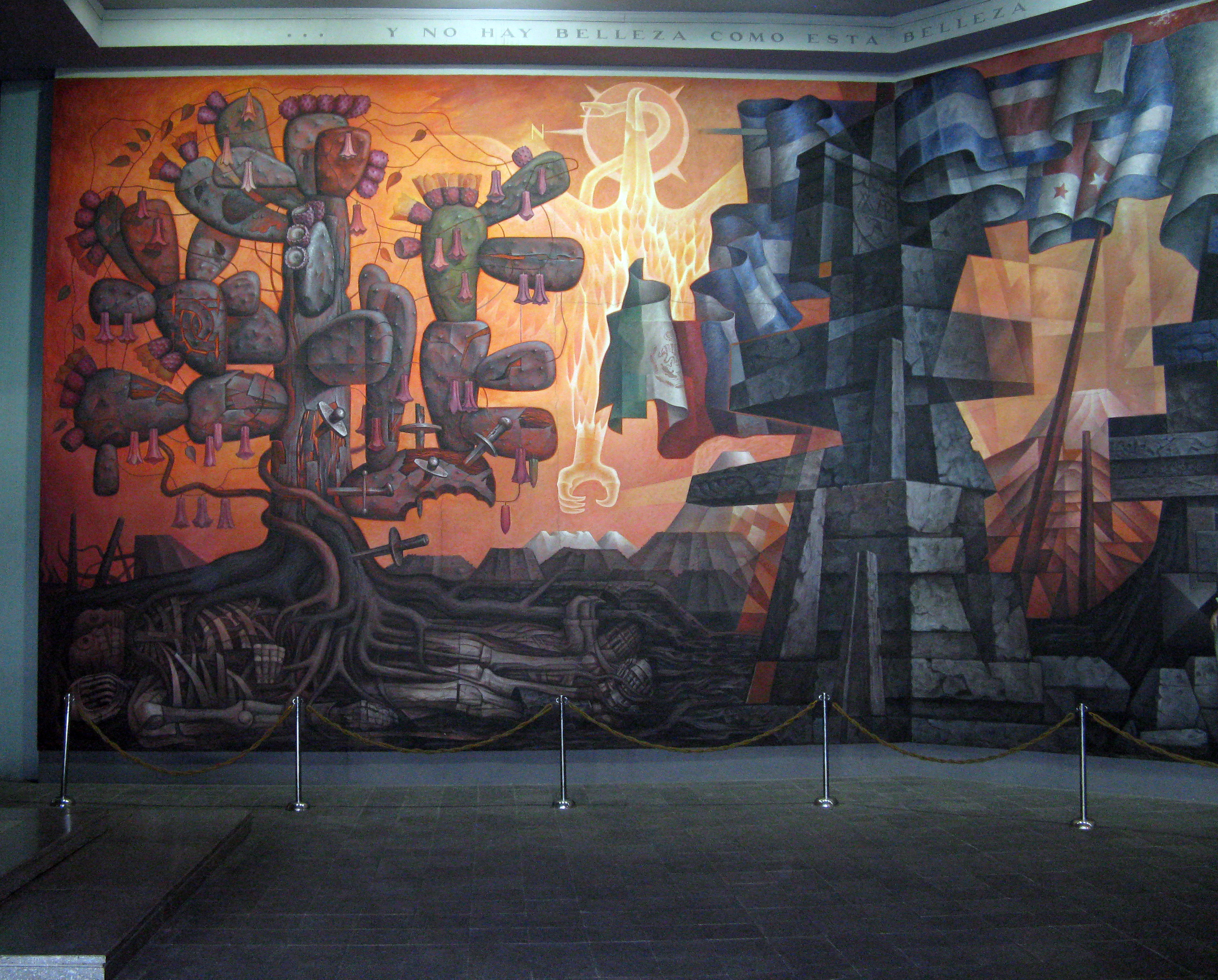 Parte del mural "Presencia de América Latina", ubicado en la Casa del Arte, Universidad de Concepción, Chile